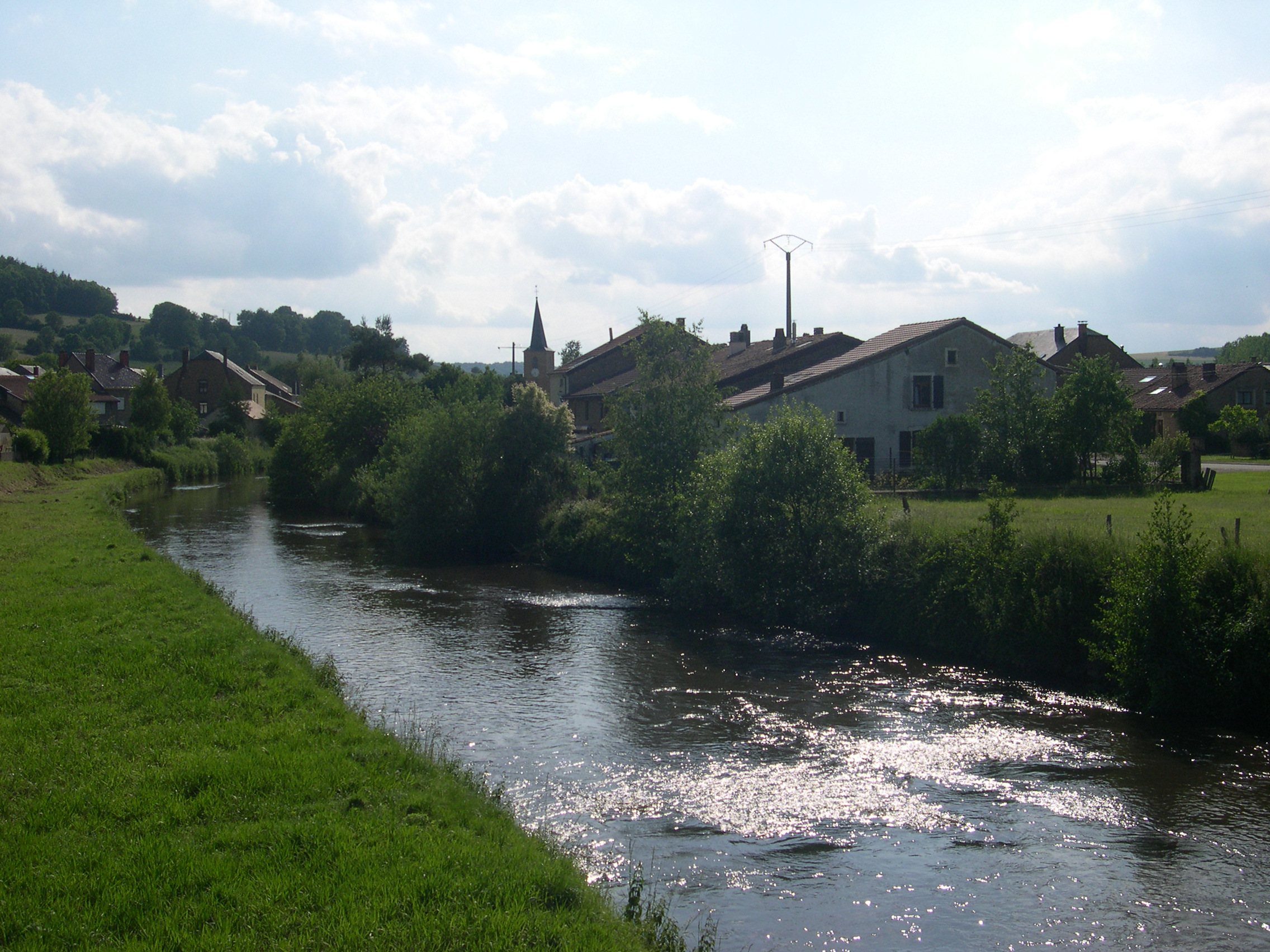 Détail du Ton (rivière) pris du pont de la rue du Régnier à Lamorteau